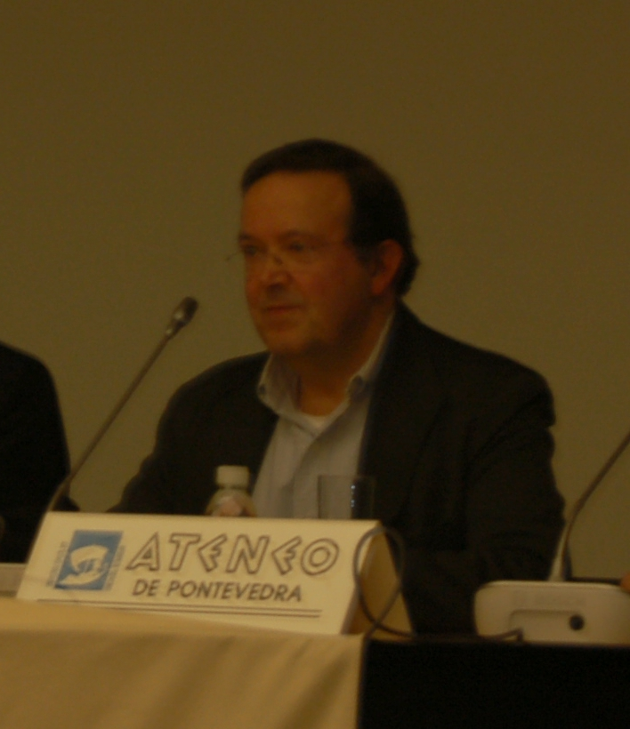 Luís Álvarez Pousa nunha charla organizada polo Ateneo de Pontevedra no Museo de Pontevedra